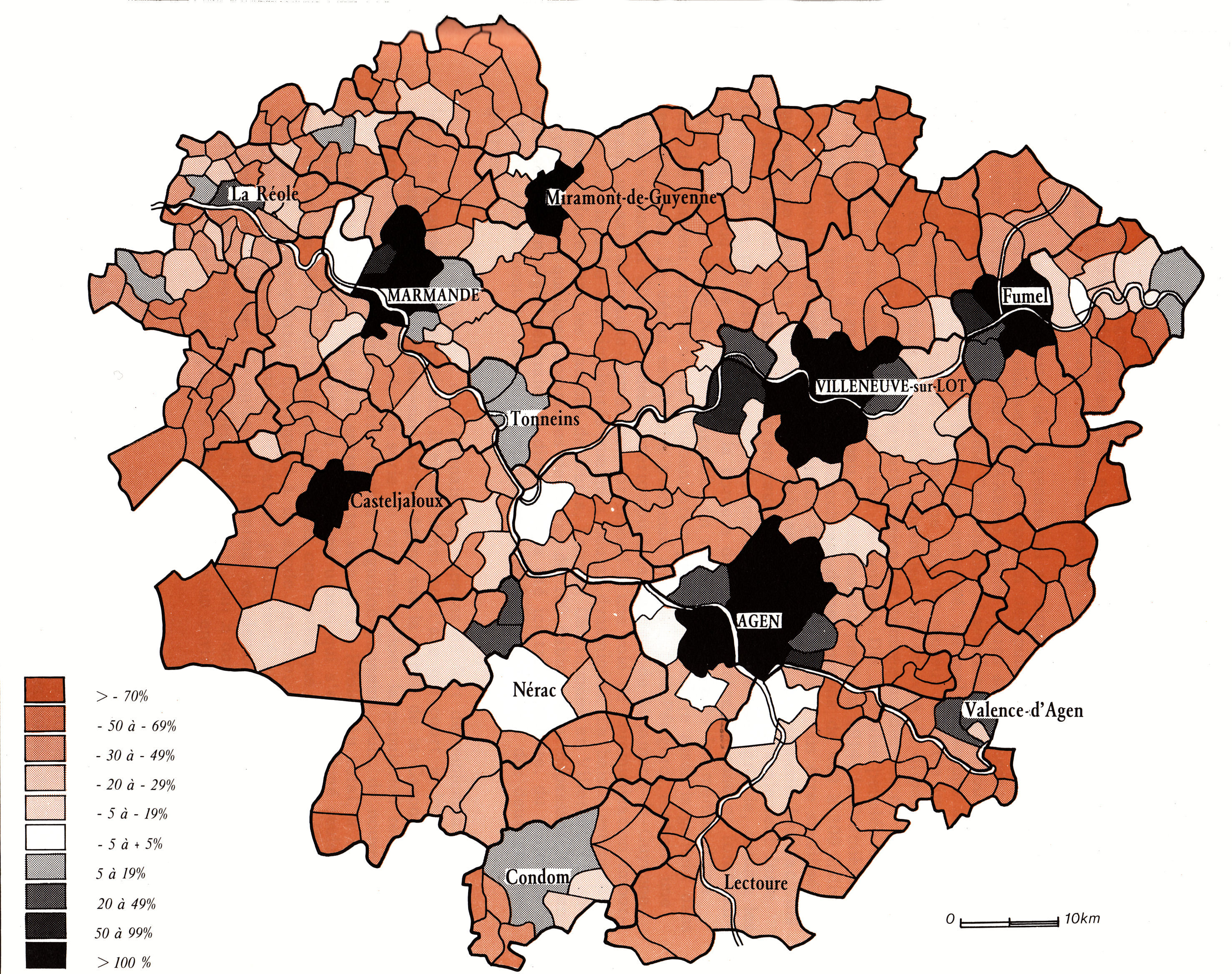 Carte de l'évolution de la population de 1841 à 1982